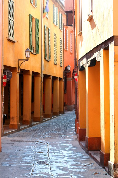 Portici di via Valdonica, nel cuore del Ghetto Ebraico This is a photo of a monument which is part of cultural heritage of Italy.